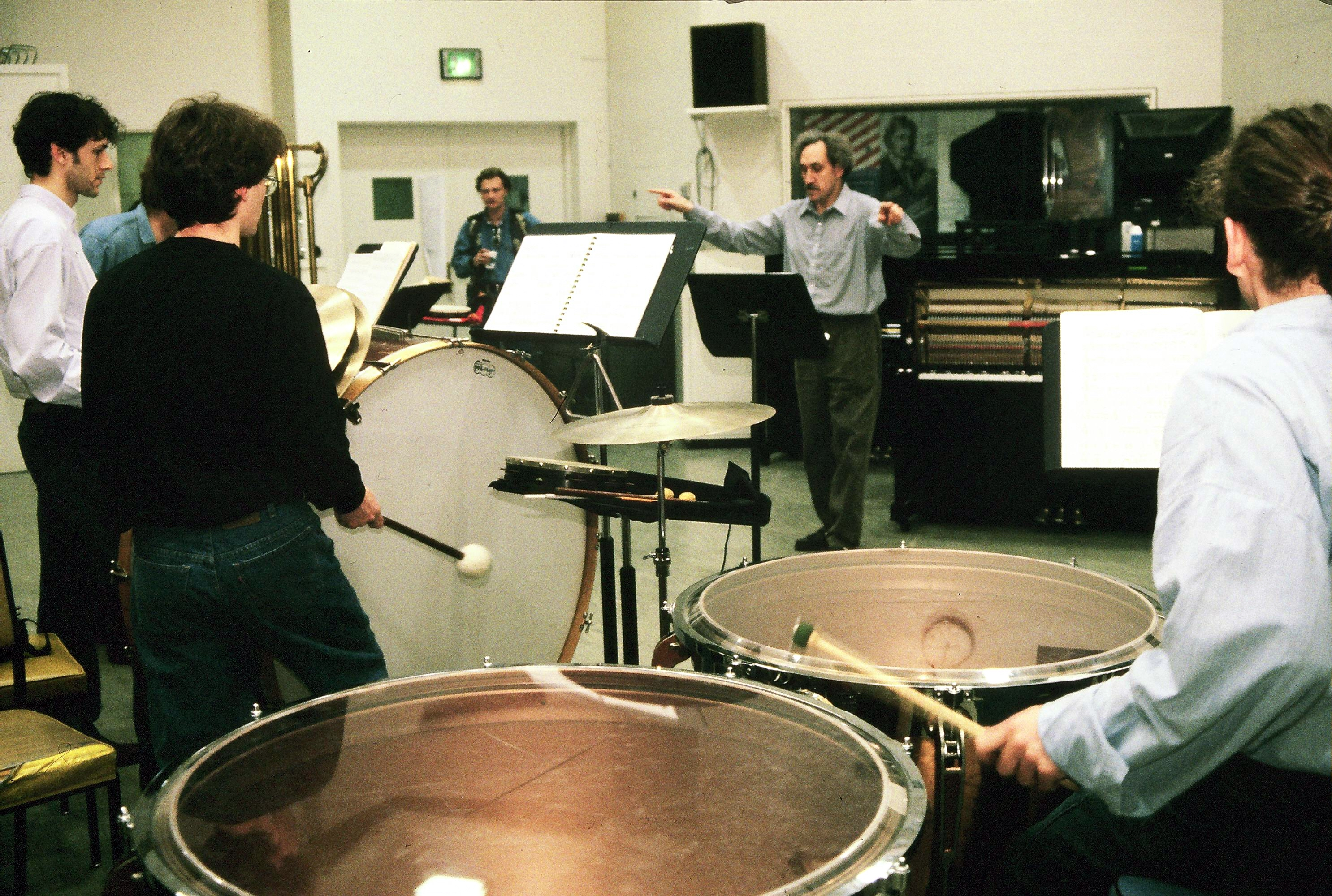 Фото Д. Покровского на репетиции в Dartmouth College